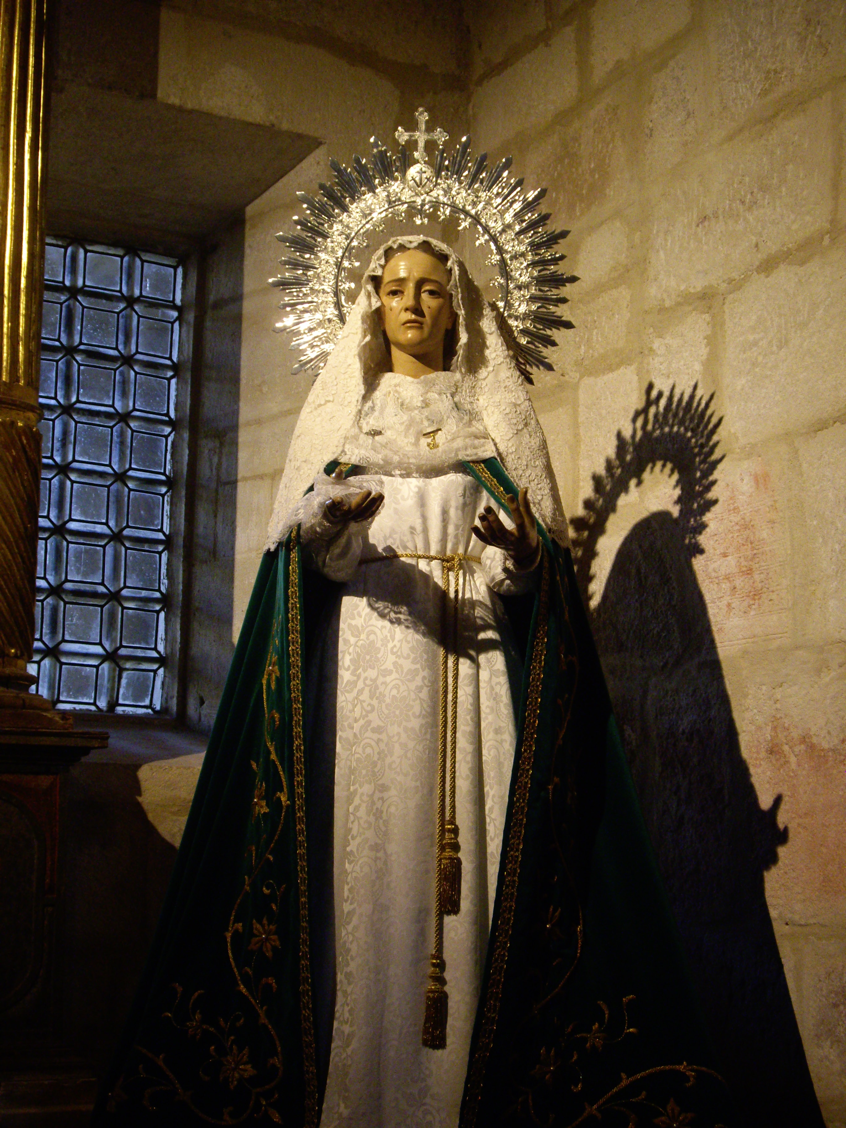 Virgen de la Esperanza, imagen de Victor de los Ríos. S. I. Catedral de Zamora